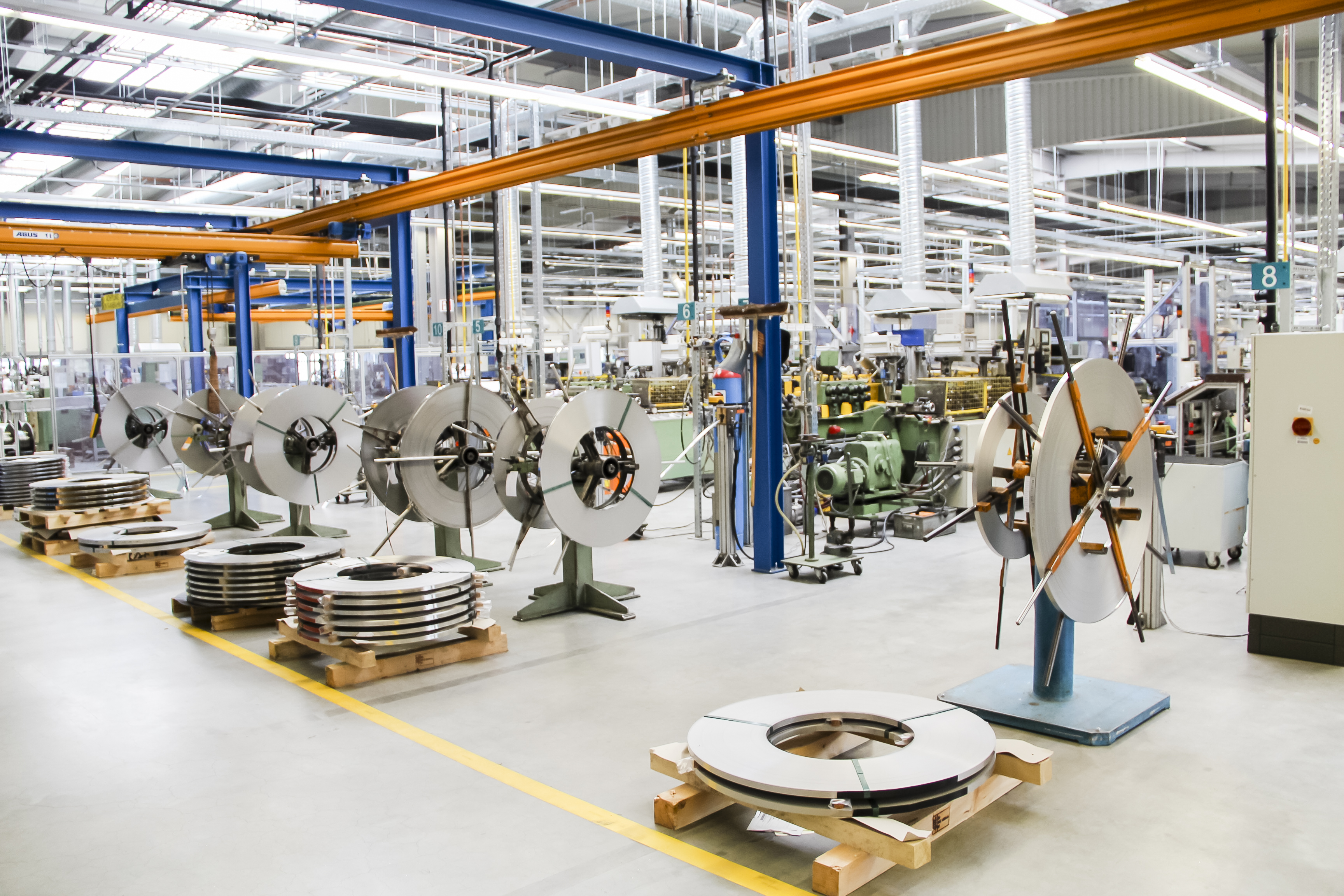 Rohrheizkörperproduktion in Oberderdingen